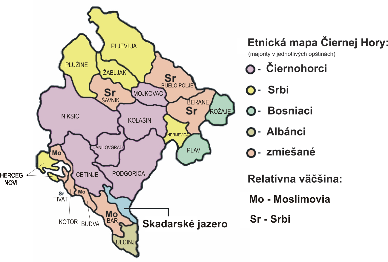 Popis = Etnická mapa Čiernej Hory Zdroj = na podklade mapy z Dátum = 05.06.2006 Autor = Kristo Povolenie = Iné verzie = Ano